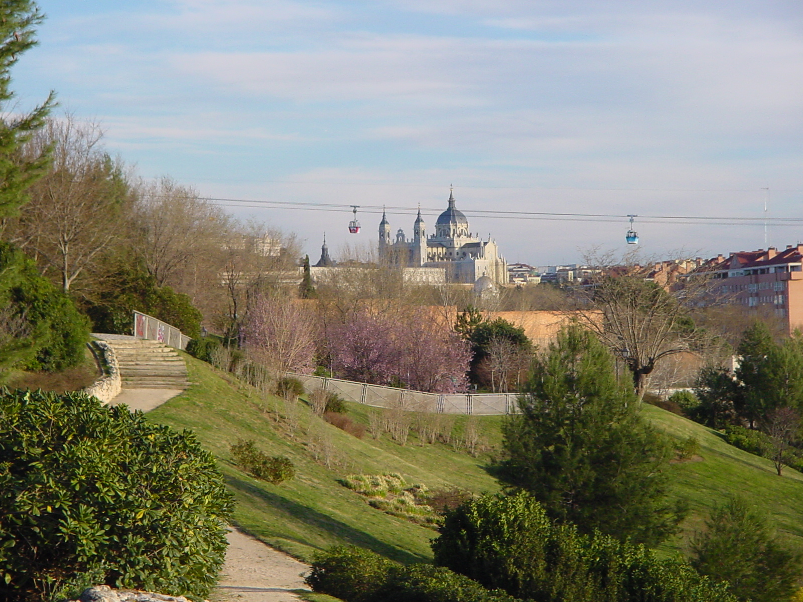 versión original vista de la catedral de madrid desde el parque del oeste